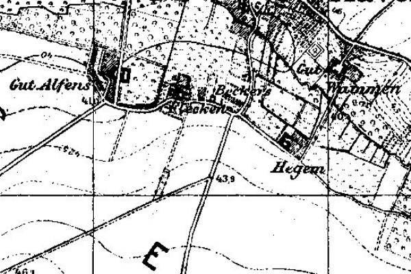 Neuaufnahme 1891 -1912